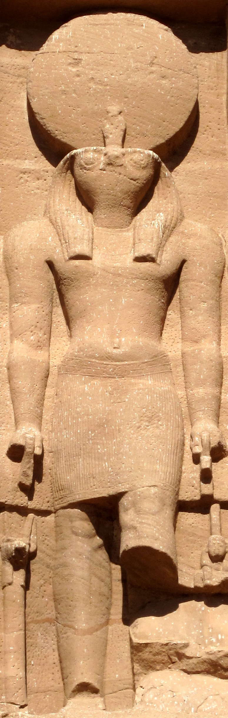 Darstellung von Re-Harachte oberhalb des Eingangs am Großen Tempel von Abu Simbel, Ägypten